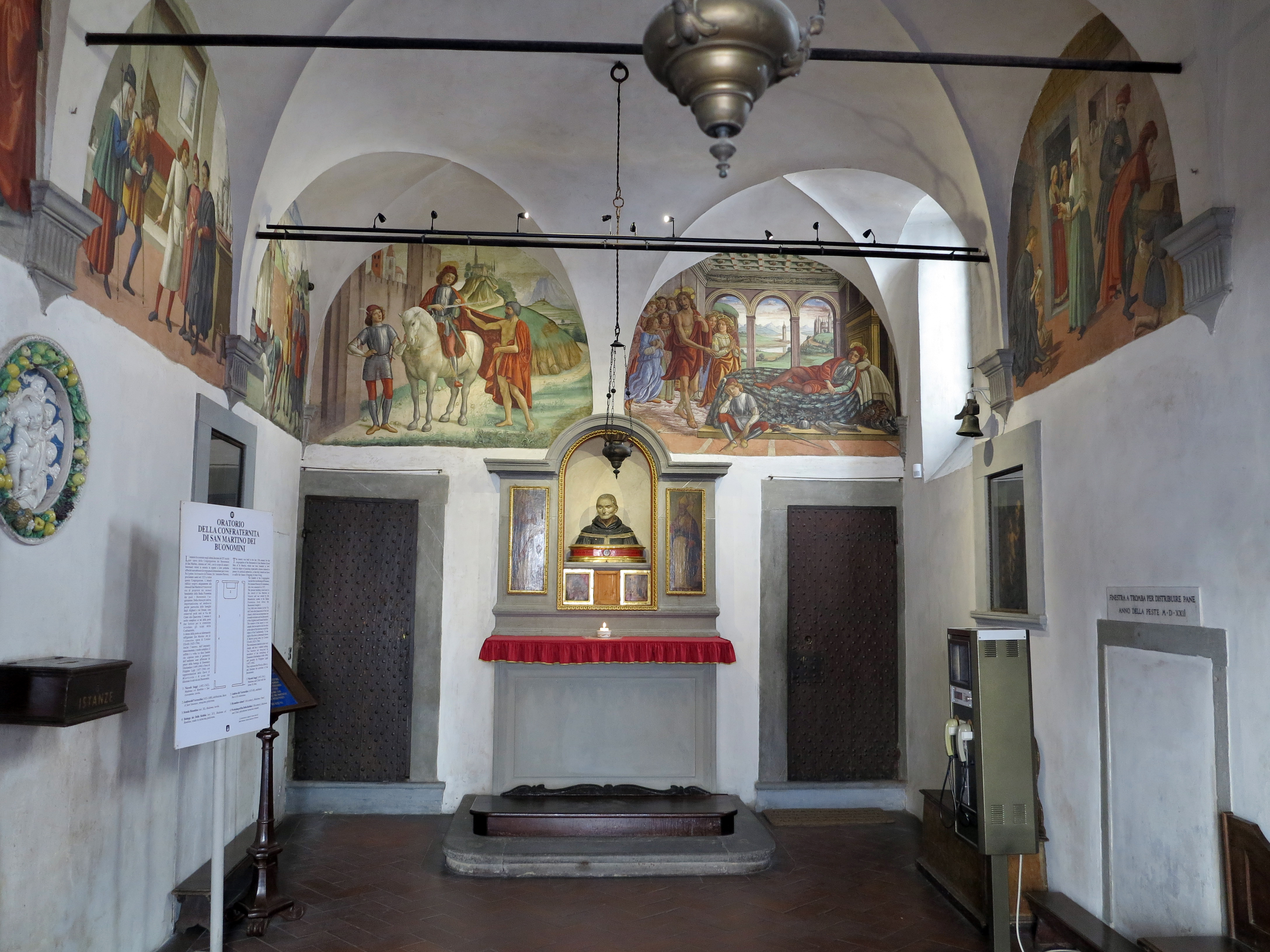 Firenze, miscellanea